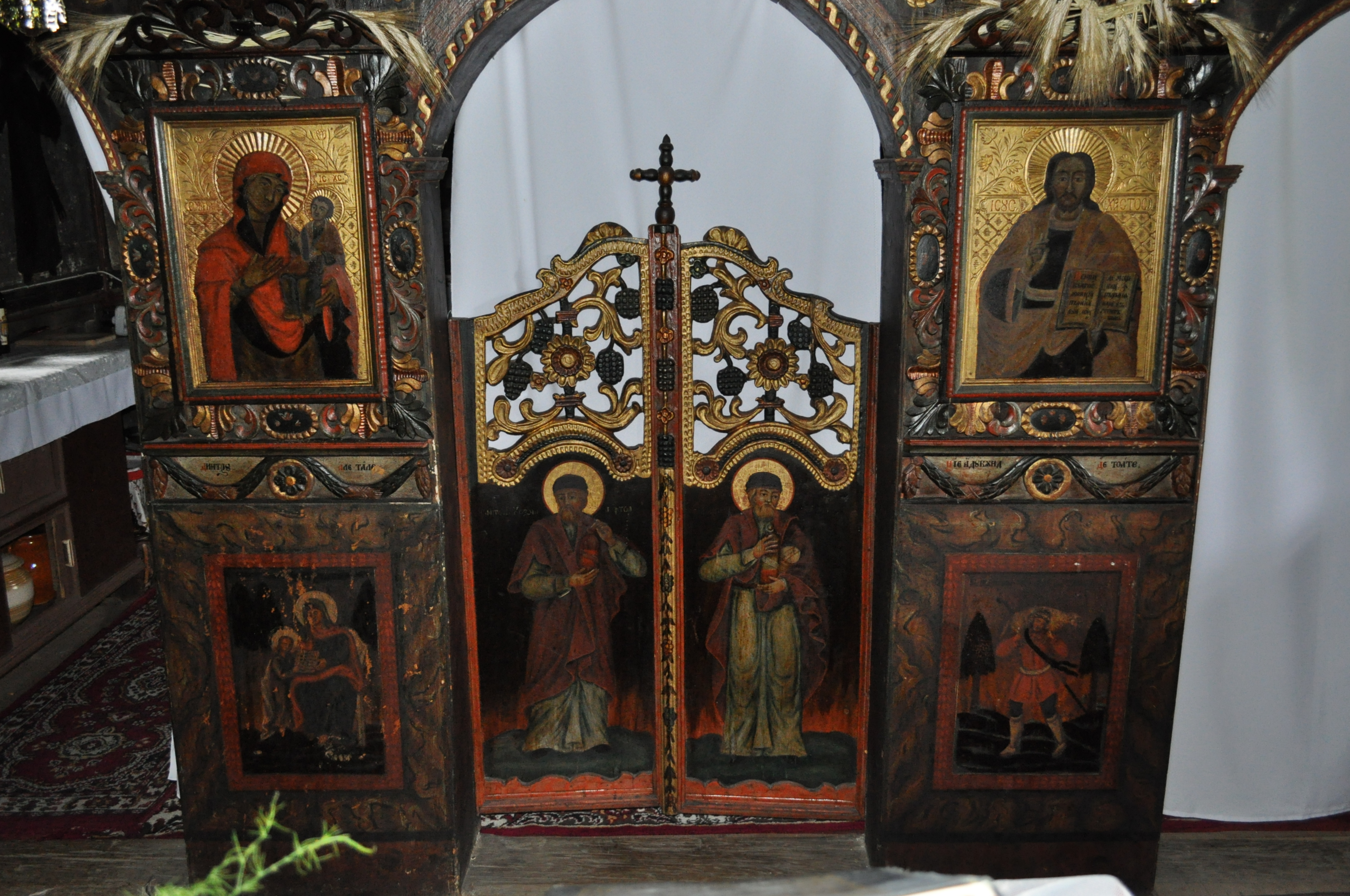 Biserica „Sf. Arhangheli Mihail și Gavriil” din Răstoci”, județul Sălaj